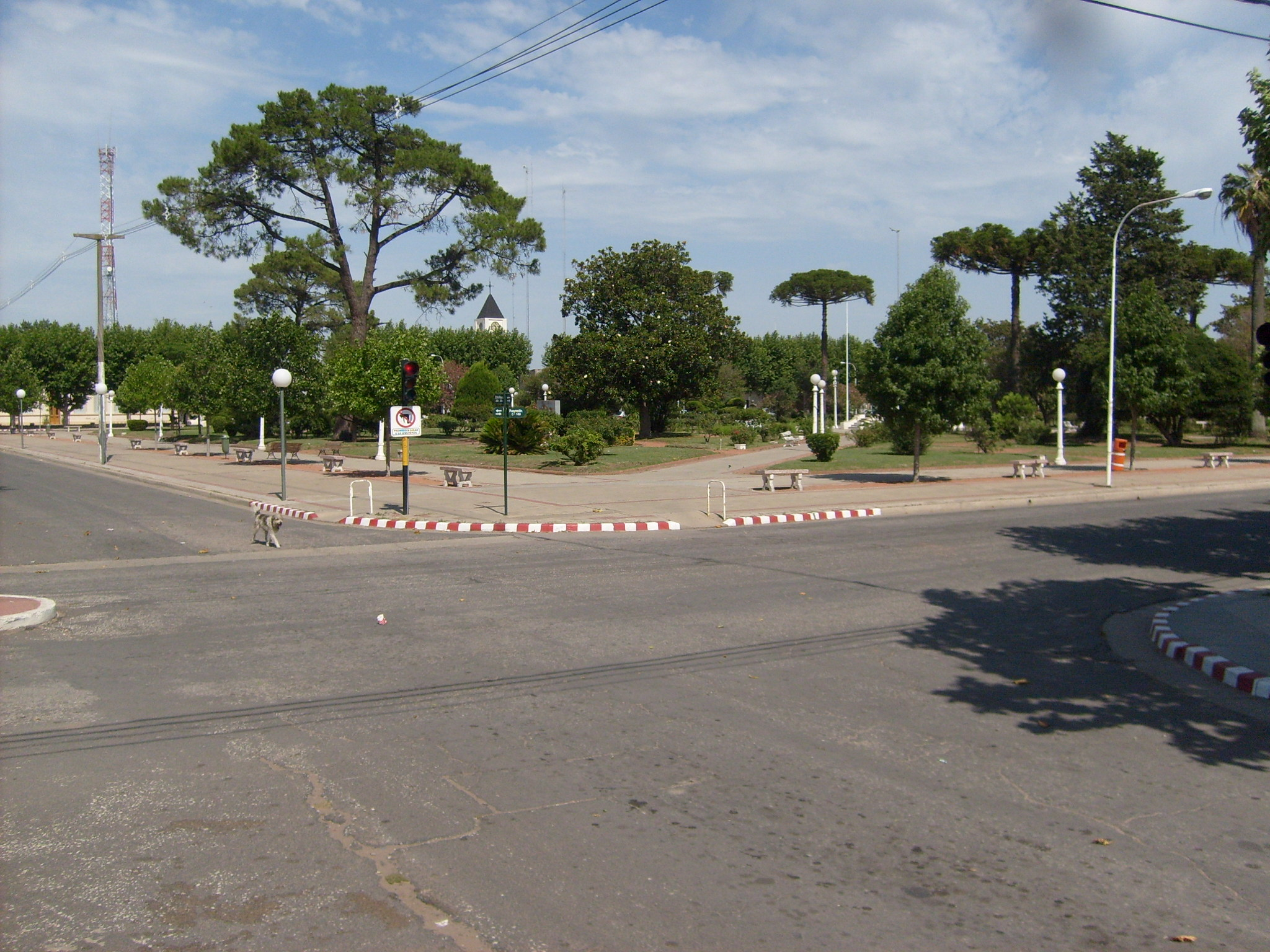 Plaza de Salliquelo